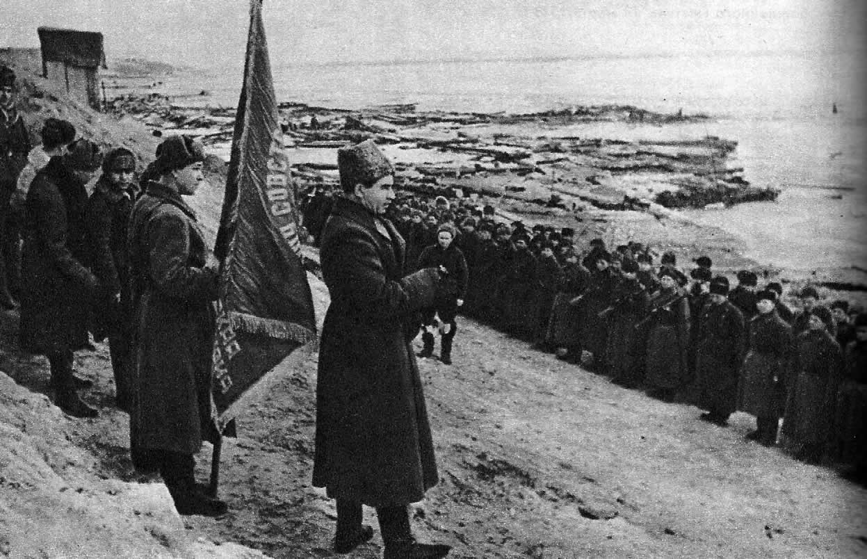 Вручение гвардейского знамени 39-й Гвардейской стрелковой дивизии. Сталинград. Январь 1943 г